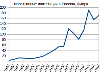 Динамика поступления иностранных инвестиций в Россию в 1995-2011 годах, в млрд долларов США.